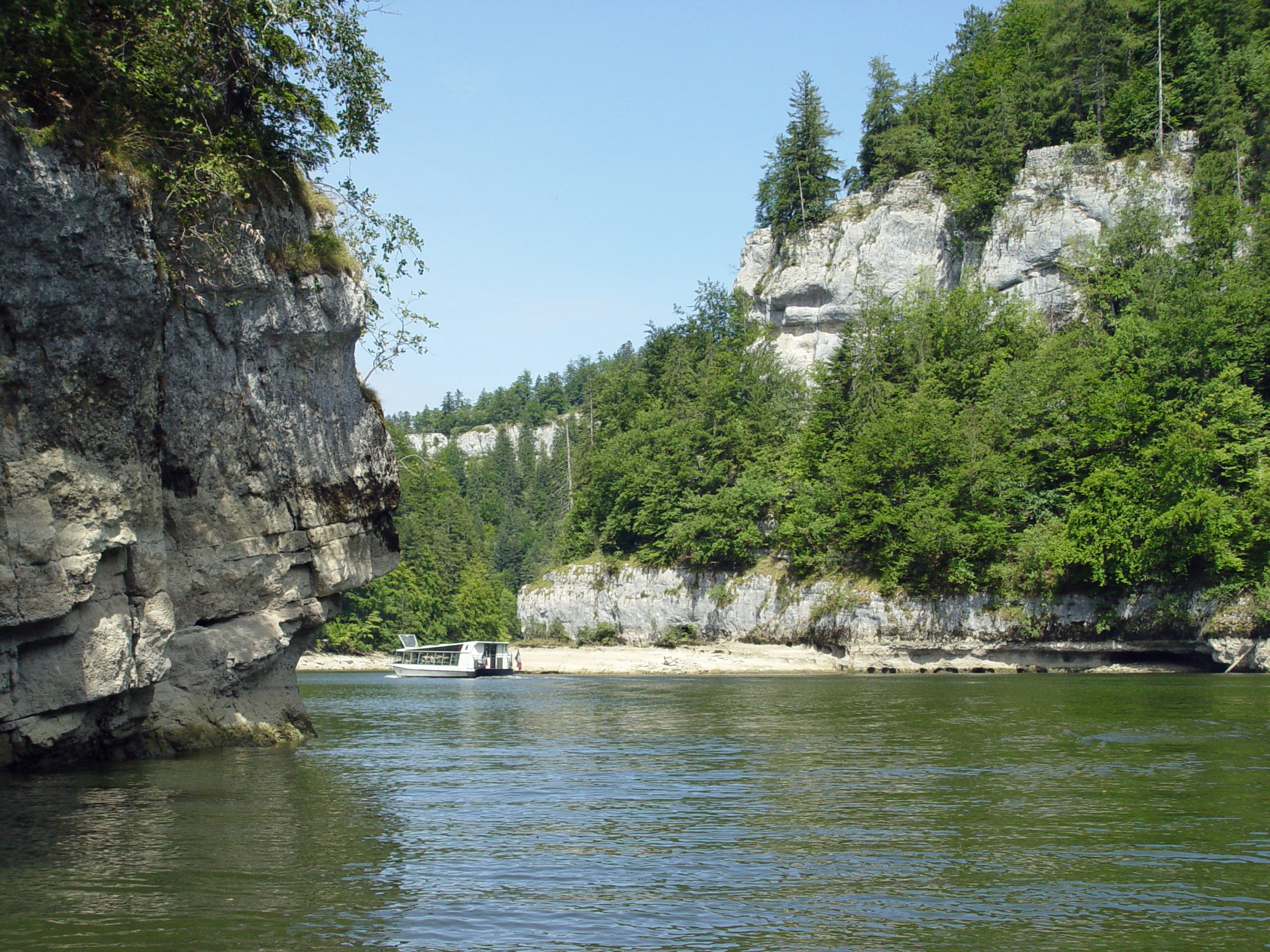 See des Brenets